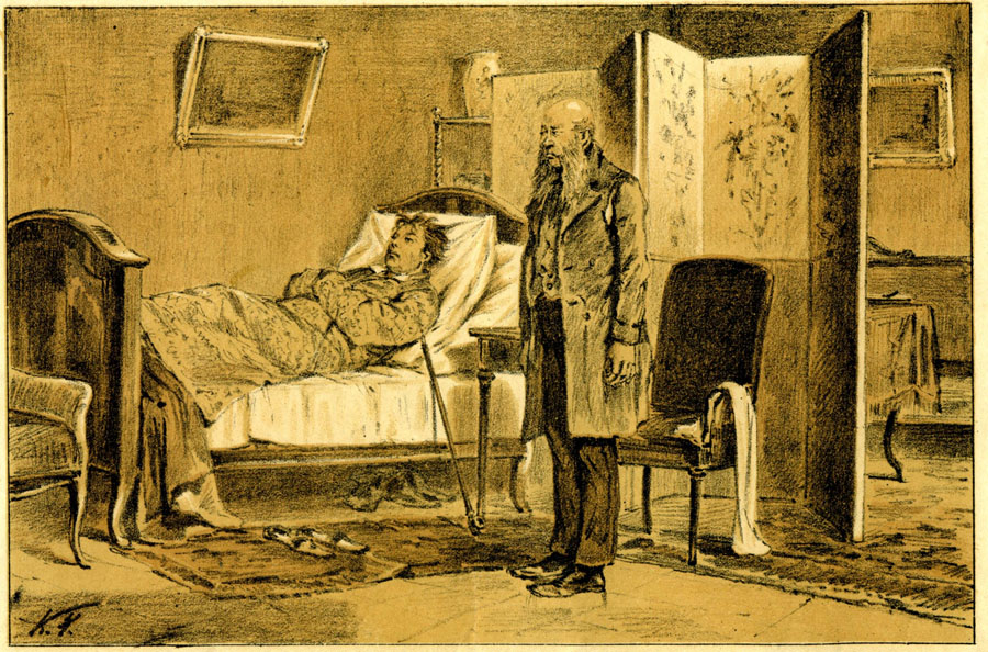 К. Н. Чичагов. Обломов и Захар - иллострация к роману "Обломов"